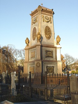 Grafmonument familie Scholten - eigen foto